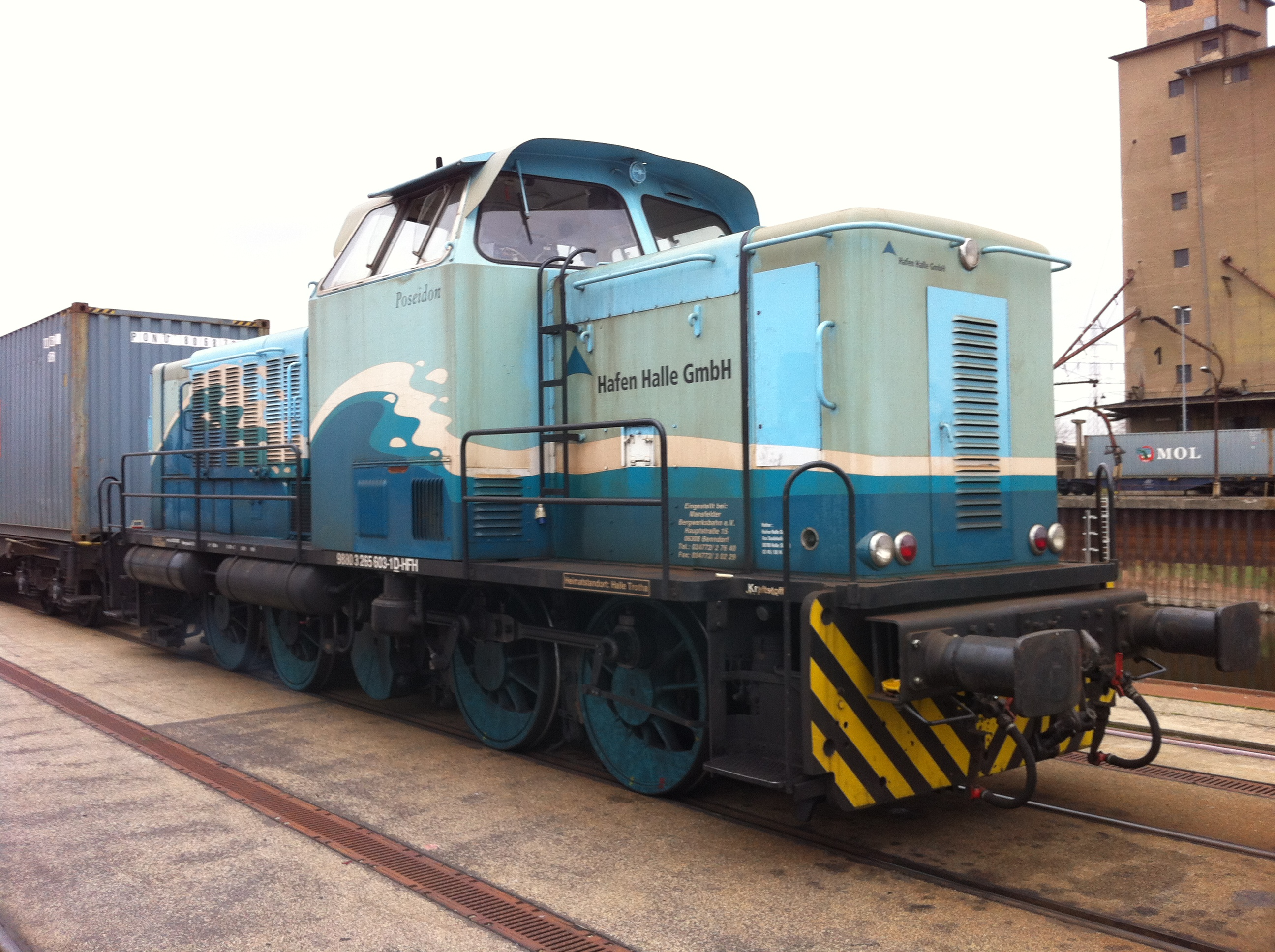 Lokomotive MaK 1200 D der Hafenbahn Halle. Sie trägt den Namen Poseidon und die Fahrzeugregistriernummer 98 80 3265 603-1 D-HFH